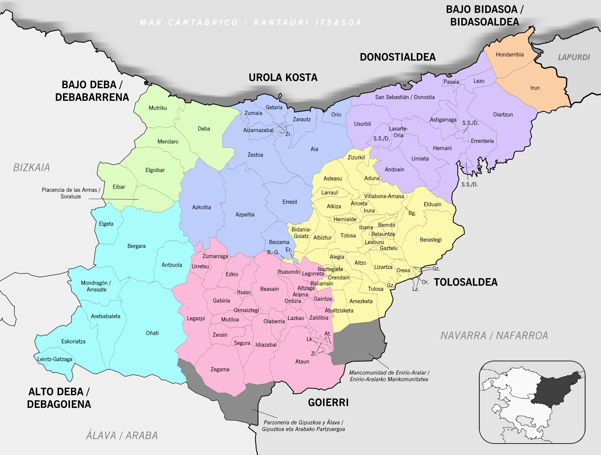 Municipios y comarcas de Gipuzkoa, actualizado a 2017 / Gipuzkoako udalerri eta eskualdeak, 2017 urtean eguneratua